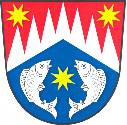 znak, Sádek , okres Svitavy